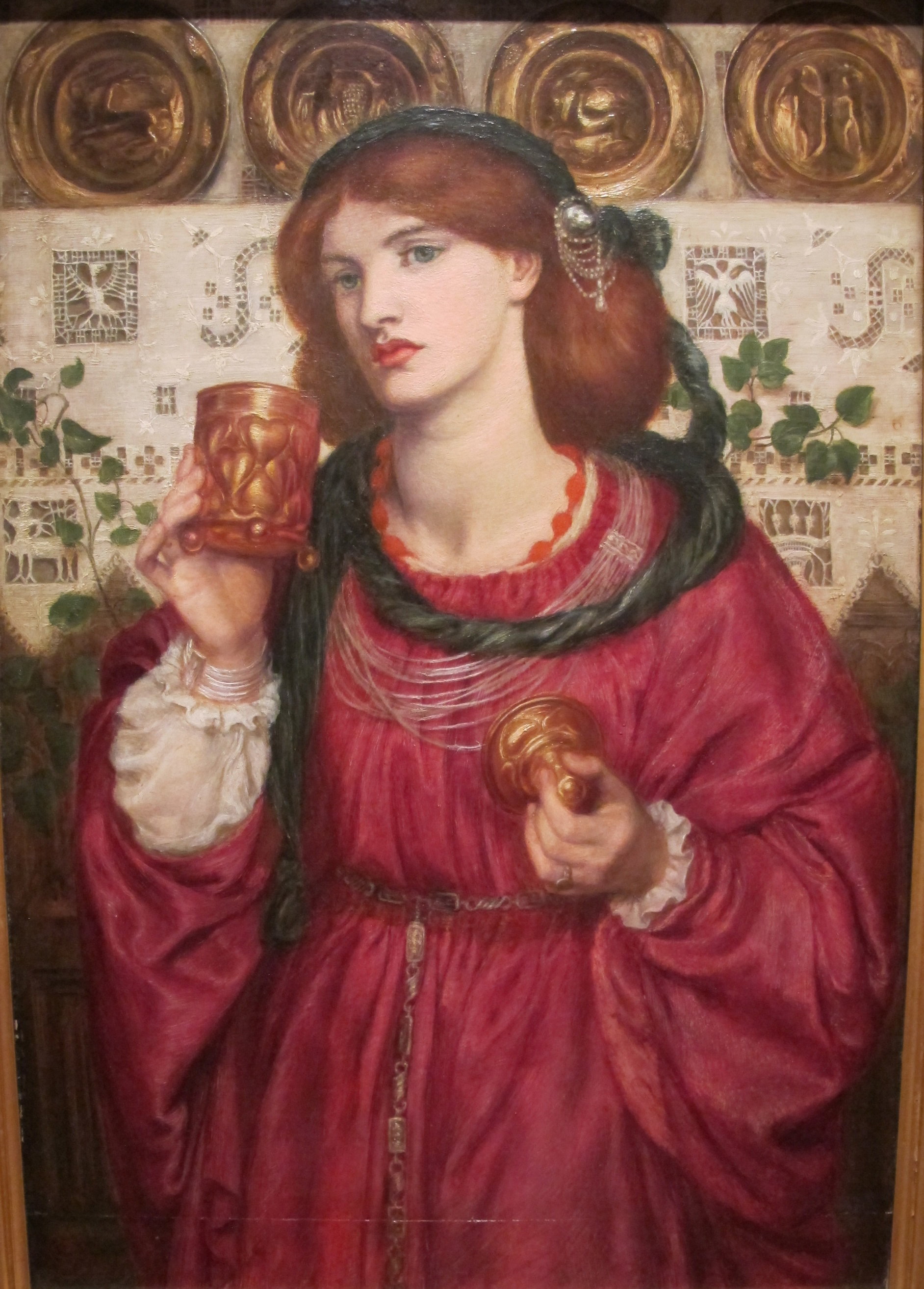 Dante gabriel rossetti, the lovin cup, 1867